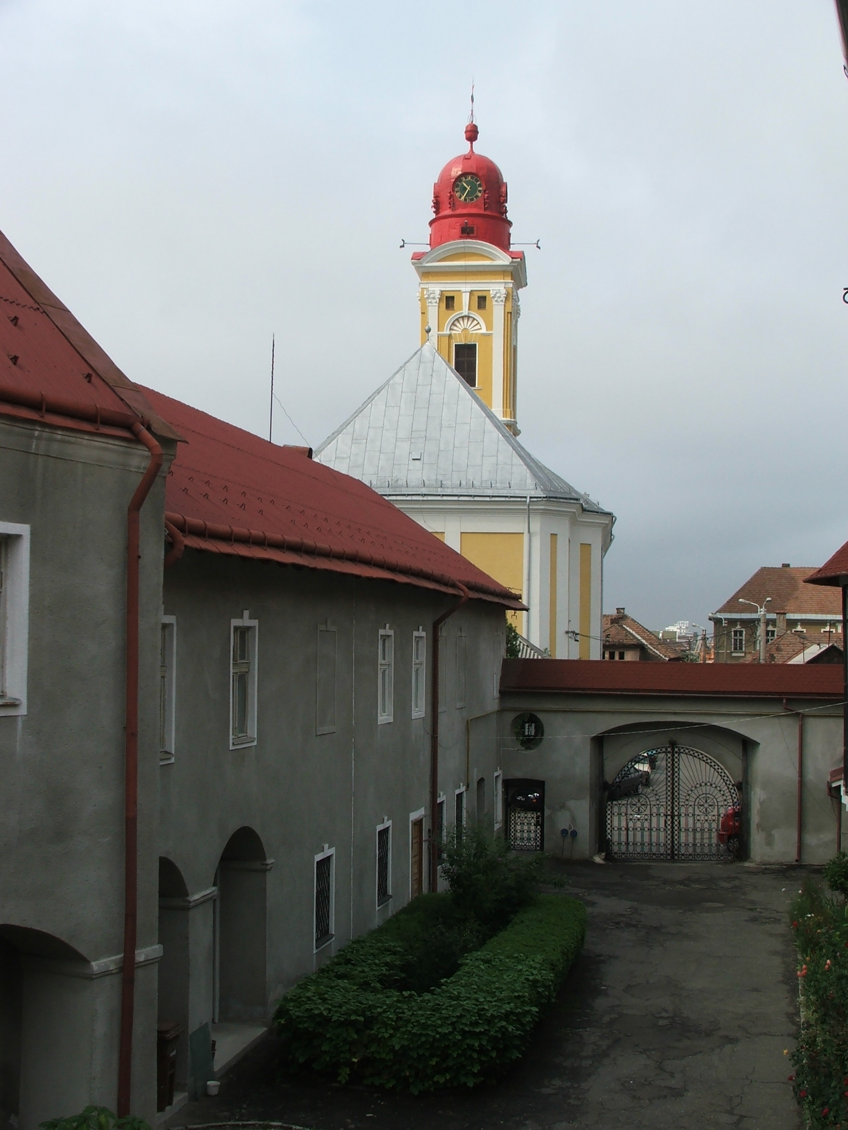 Nagybánya, régi pénzverde